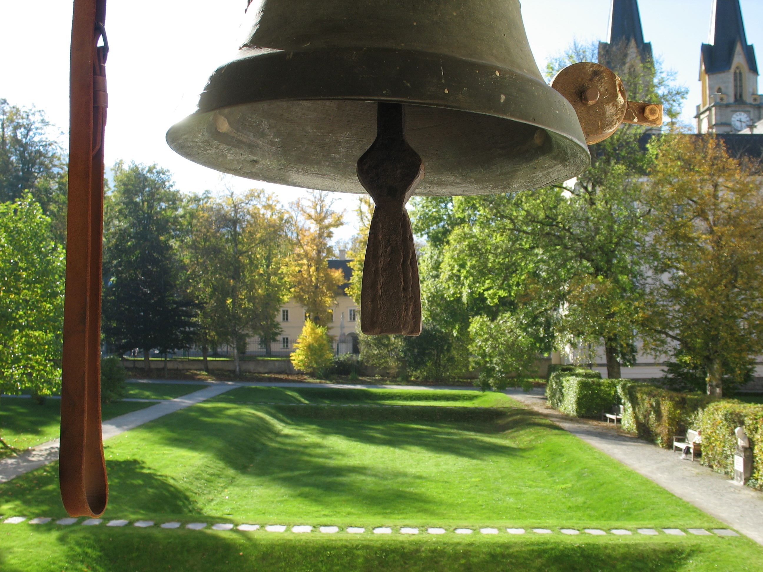 Glocke für das Läuten zum Stundengebet, Stift Admont, Steiermark